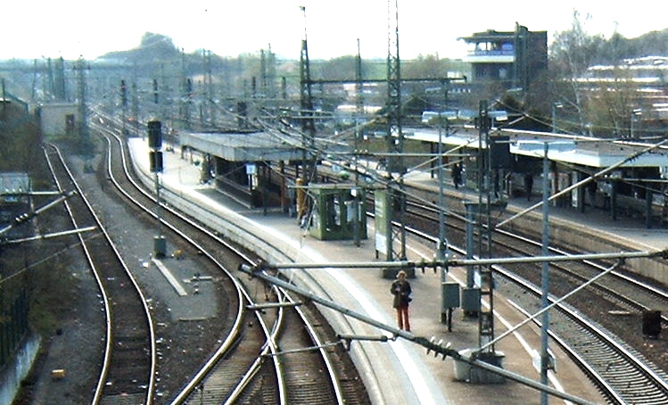 Bahnhof Waiblingen, Blick auf die Remsbahn-Gleise Richtung Westen